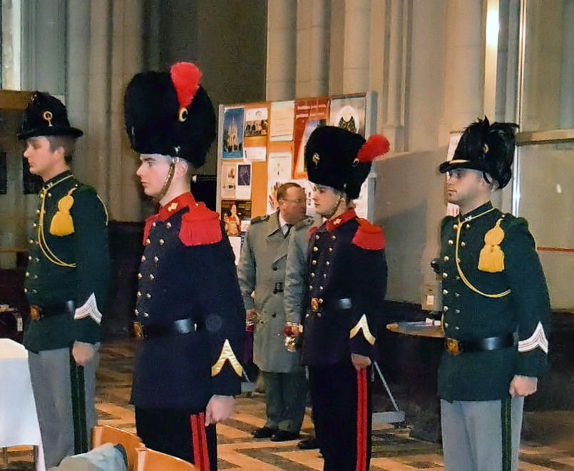 Laken, Dienst van ZKH Prins Boudewijn